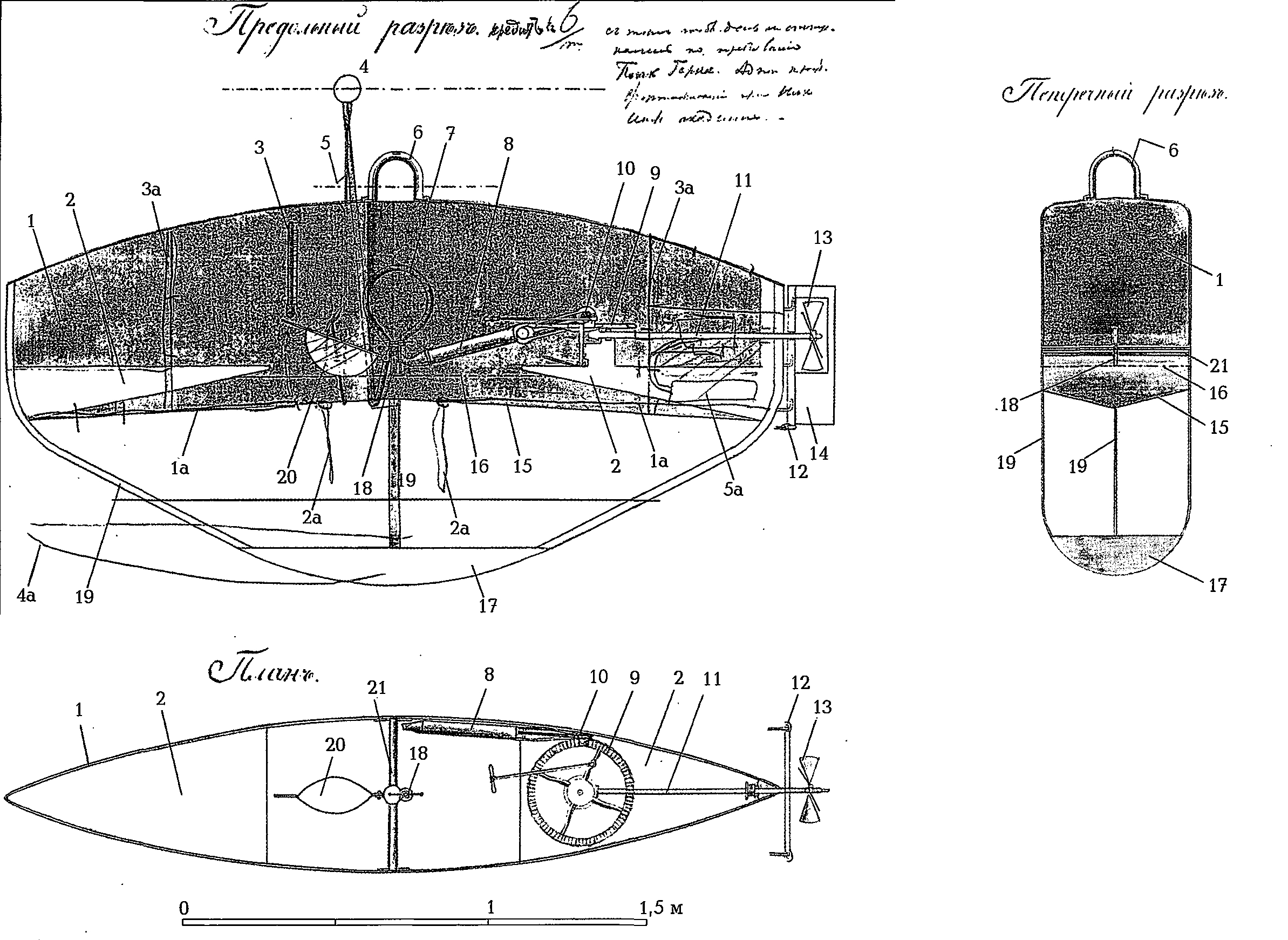 1 - обшивка бортов; 2 - платформы для размещения команды; 3 - манометр; 4 - поплавок с воздушным шлангом (7) и ограничительным штертом (5); 6 - стеклянный смотровой колпак; 8 - воздушный насос; 9 - ведущая шестерня привода гребного вала; 10 - коленчатый привод насоса; 11 - гребной вал; 12 - румпель вертикального руля; 13 - гребной винт; 14 - вертикальный руль; 15 - нижняя кромка обшивки бортов; 16 - уровень воды внутри аппарата; 17 - балластный ящик; 18 - колено трубопровода; 19 - железные полосы - подвес балластного ящика; 20 - поплавок - регулятор погружения-всплытия; 21 - трубопровод стравливания за борт избыточного давления. Наброски изменений, осуществленный при постройке: 1а - участки днища; 2а - дверцы; 3а - проницаемые переборки; 4а - удлиненные балластный ящик; 5а - воздушный (кислородный) баллон.